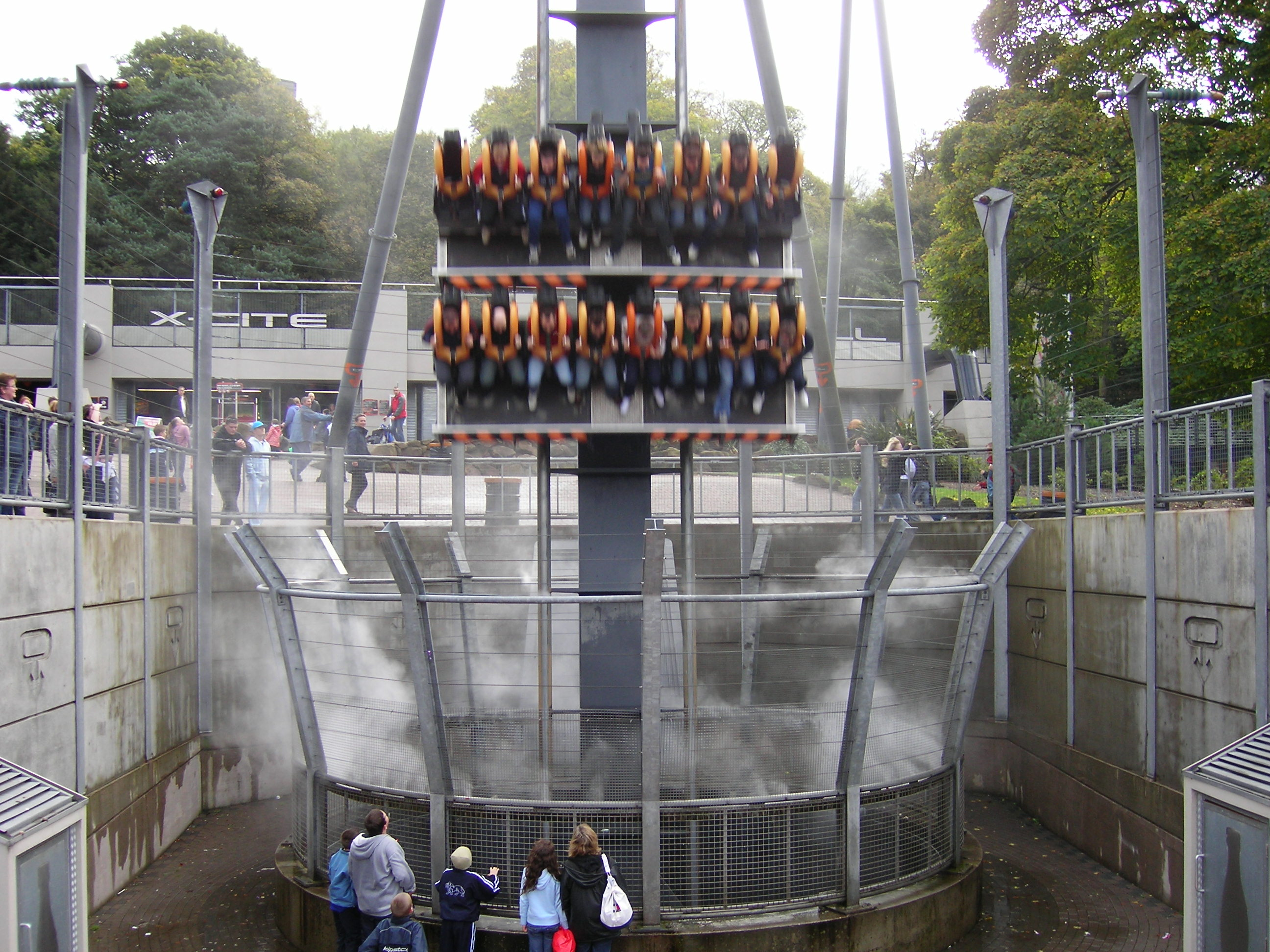 Oblivion , montagnes russes à Alton Towers